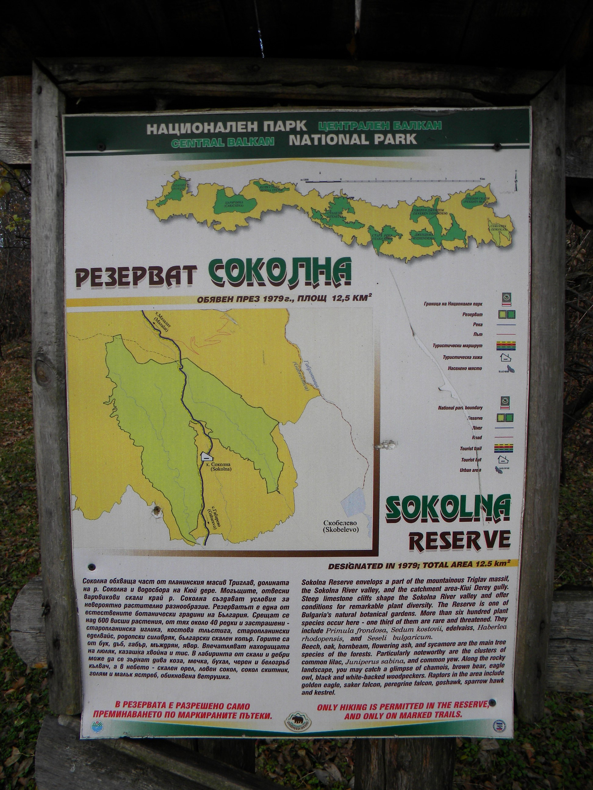 Резерват Соколна